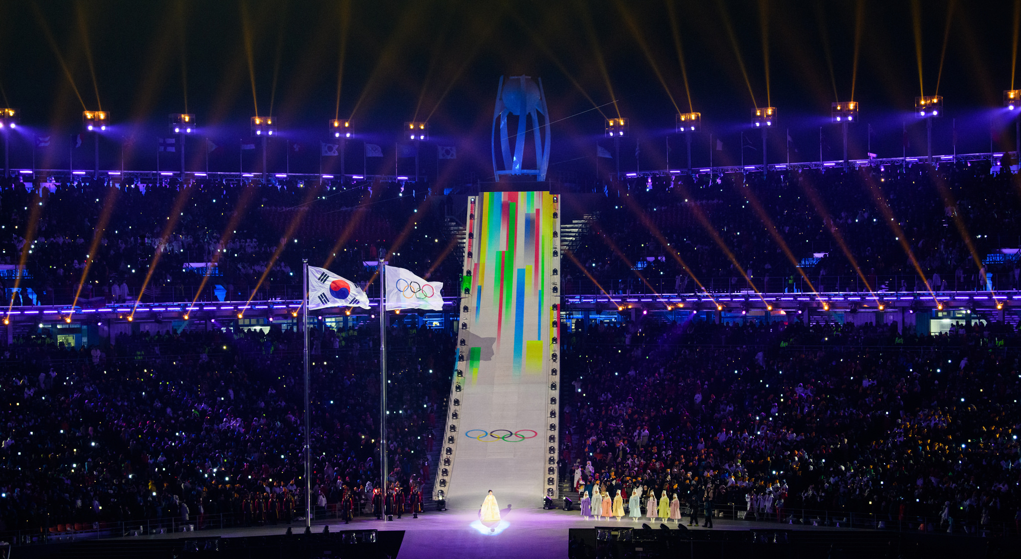 2018 PyeongChang Winter Olympic